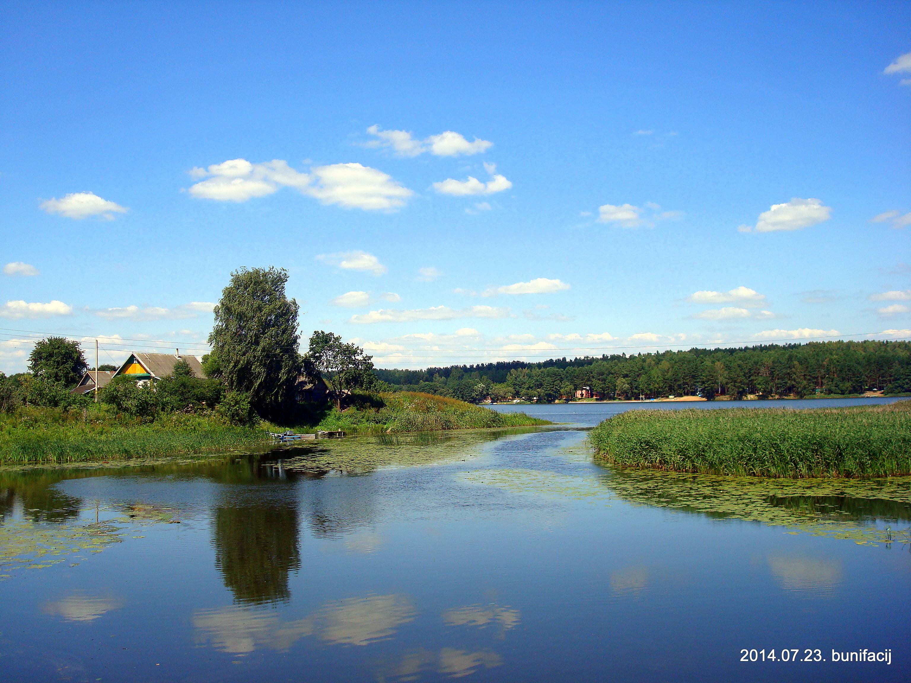 Вид на озеро Щаты